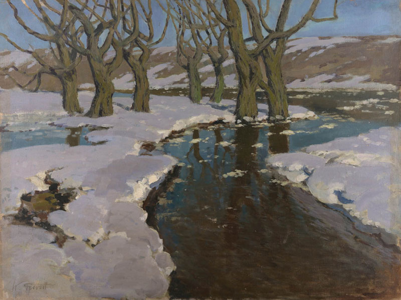 Purvītis V. Agrs pavasaris. 1898 – 1899, Audekls, eļļa, 56,7 x 74,8 cm. LNMM. Foto: N. Brasliņš